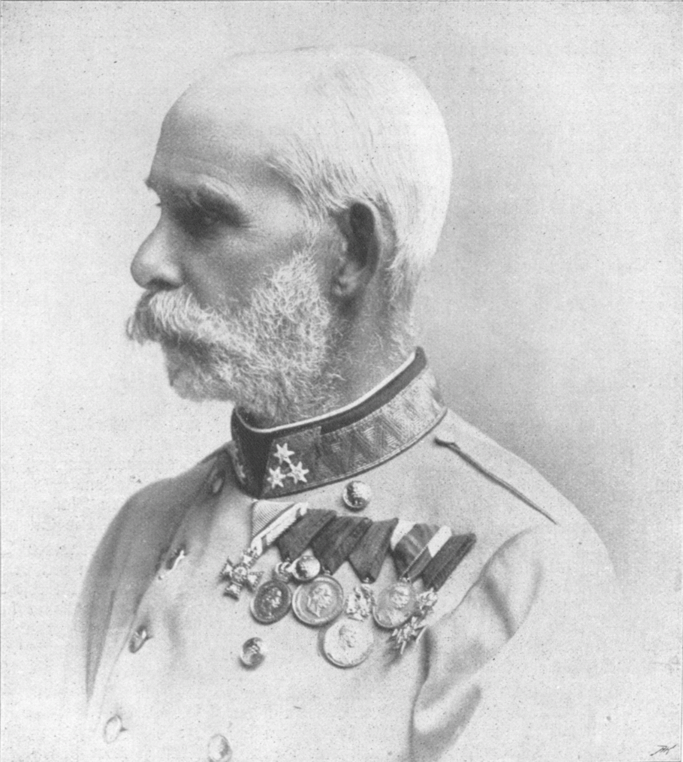 Erzherzog Rainer Ferdinnd (1827–1913)